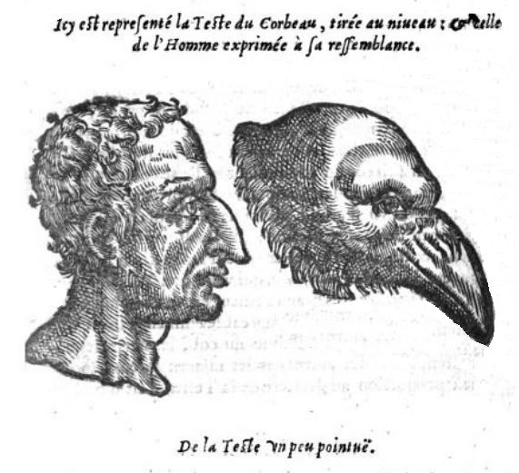 Comparaison avec une tête de corbeau, Della Porta, De humana physiognomonia